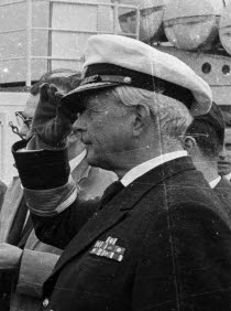 Ausschnitt aus File:Besuch von Bundespräsident Heinrich Lübke zur Kieler Woche 1963 (Kiel 4.213).jpg an Bord des Zerstörer Z 5 (D 179). Ankunft am Oslokai. Im Bild begrüßt der Befehlshaber Wehrbereichskommandos I. Konteradmiral Hans Rudolf Rösing (rechts) den Bundespräsidenten Heinrich Lübke.